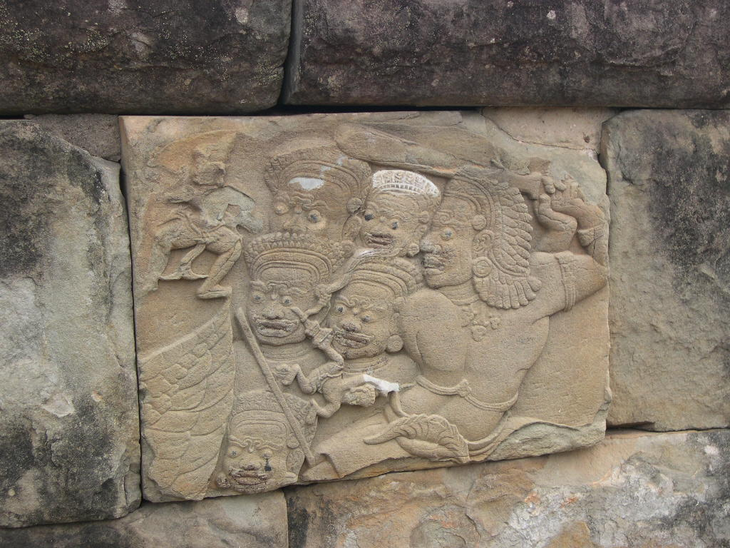 Relief - Bakongtempel